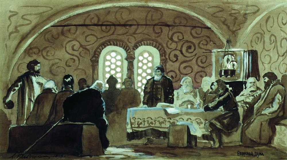 Боярская дума. 1893. Бумага, акварель. Луганский областной художественный музей, Луганск